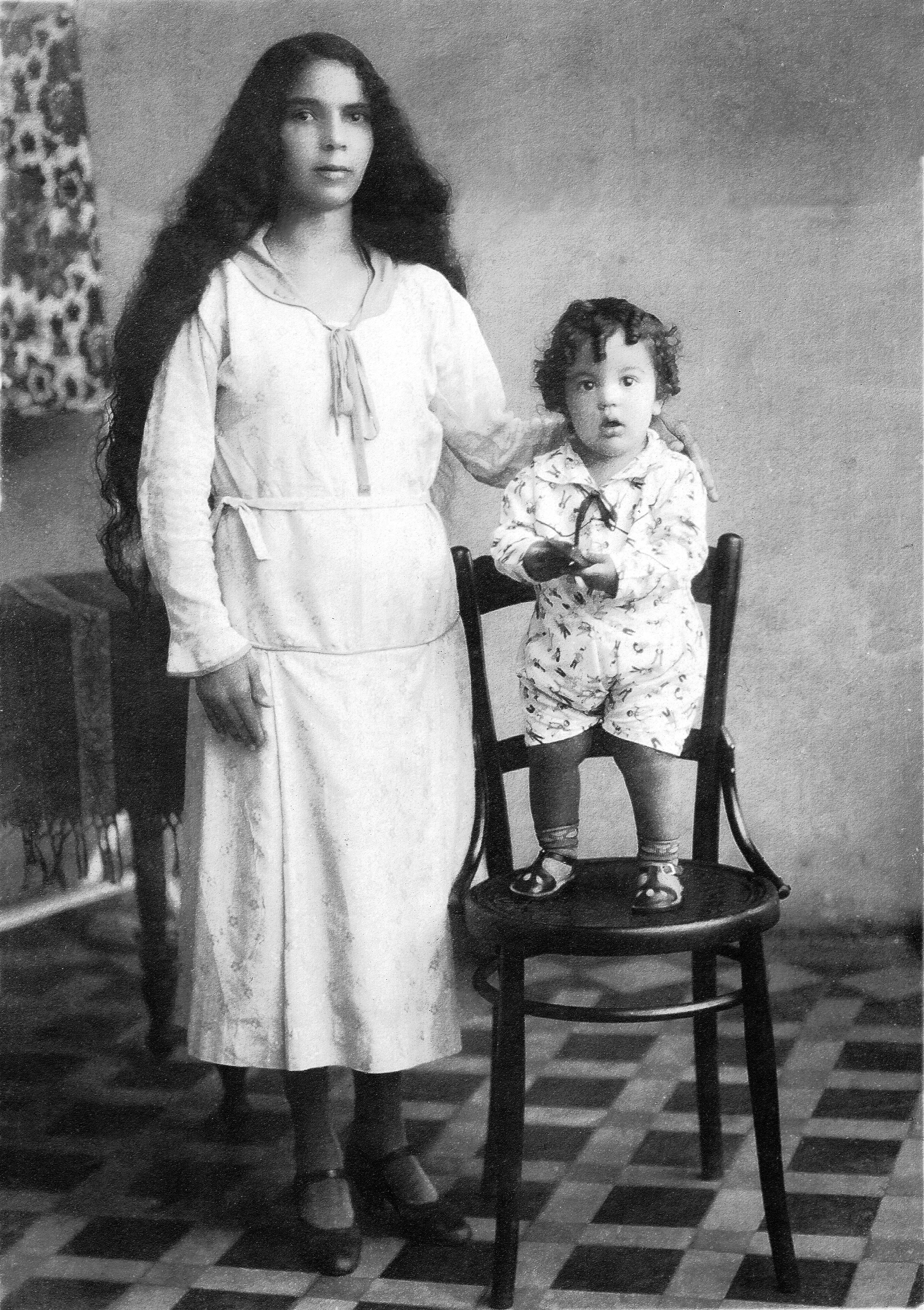 A la izquierda una criada, a la derecha un niño de nombre Castor Hernández. La foto es perteneciente a una familia que vivía en Los Teques, capital del Edo. Miranda, Venezuela.